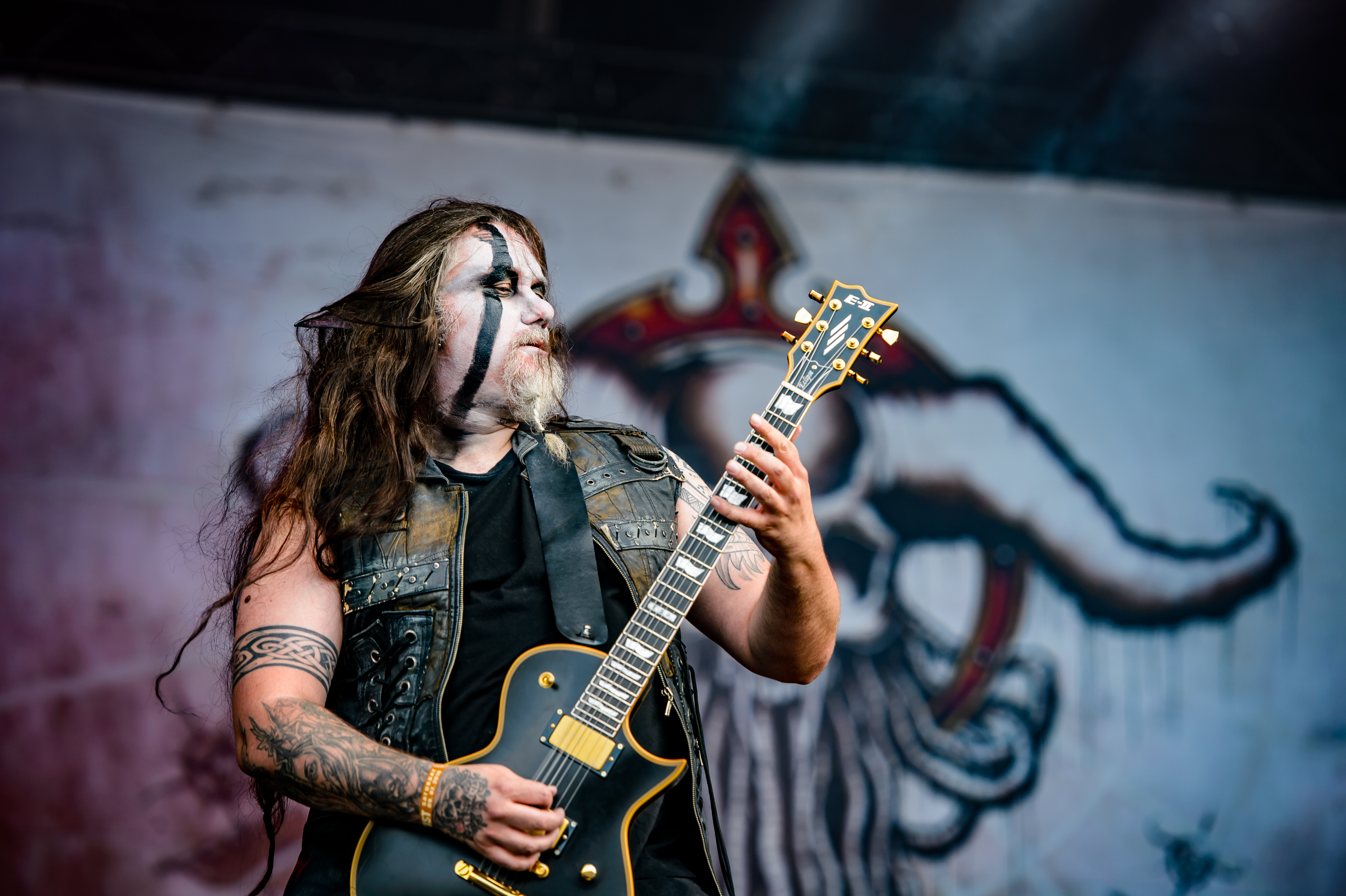 'RockHarz Open Air 2016; Ballenstedt': 'Finntroll'